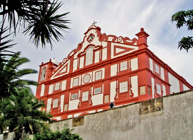 Vermelho